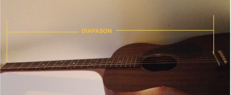 Diapason 645 mm della chitarra Martin 00-15 di Nicola Cellamare